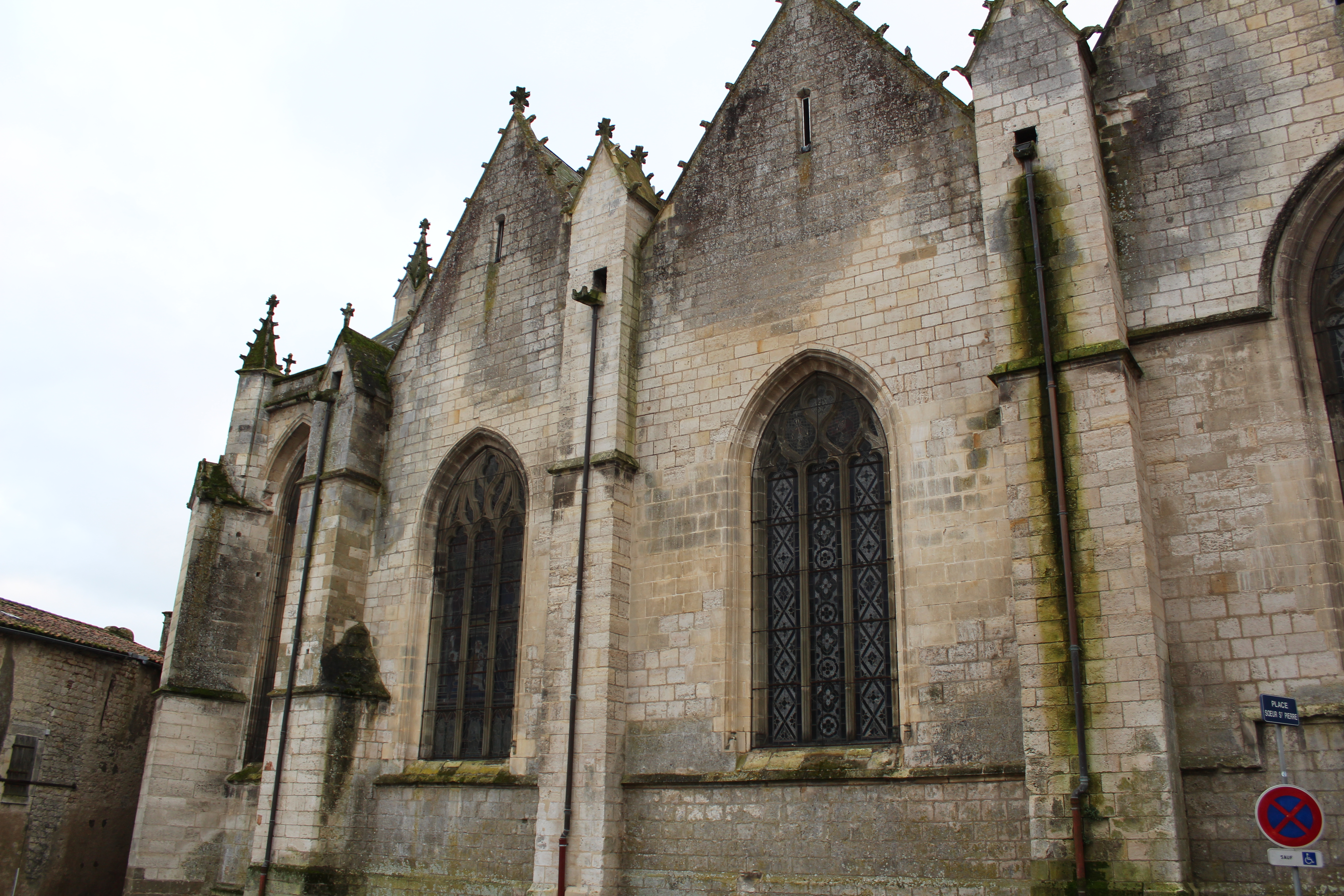 Élévation extérieur troisième et quatrième travée - Façade Nord - Eglise Notre-Dame de Fontenay-le-Comte